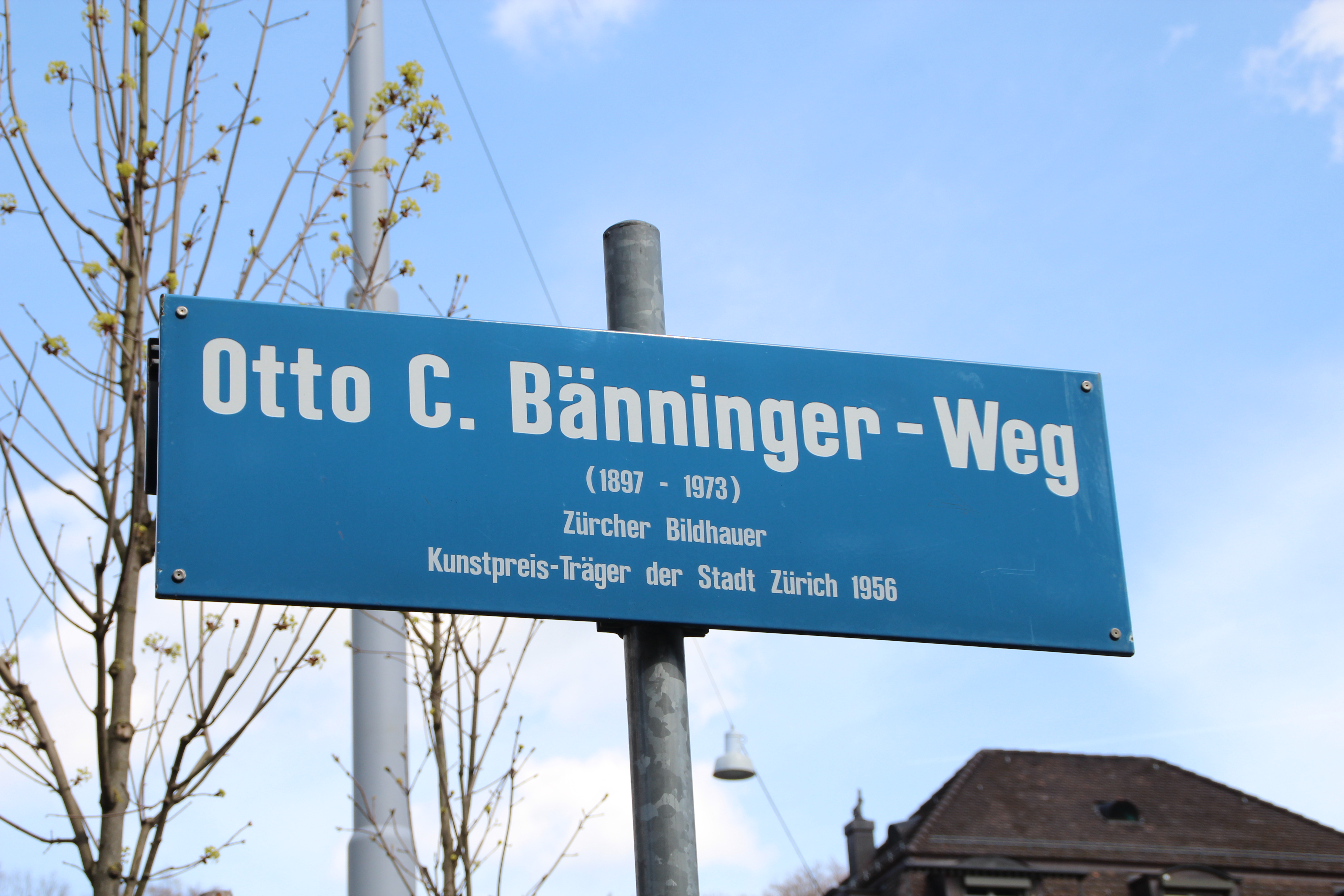 Strassenschild im Gedenken an Otto Charles Bänninger